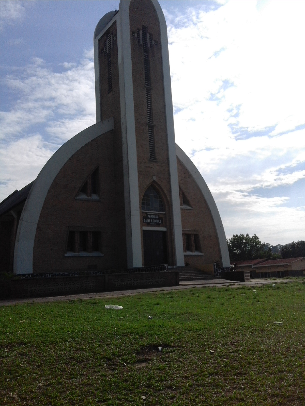 Eglise Saint Léopold à Ngaliema, Kinshasa